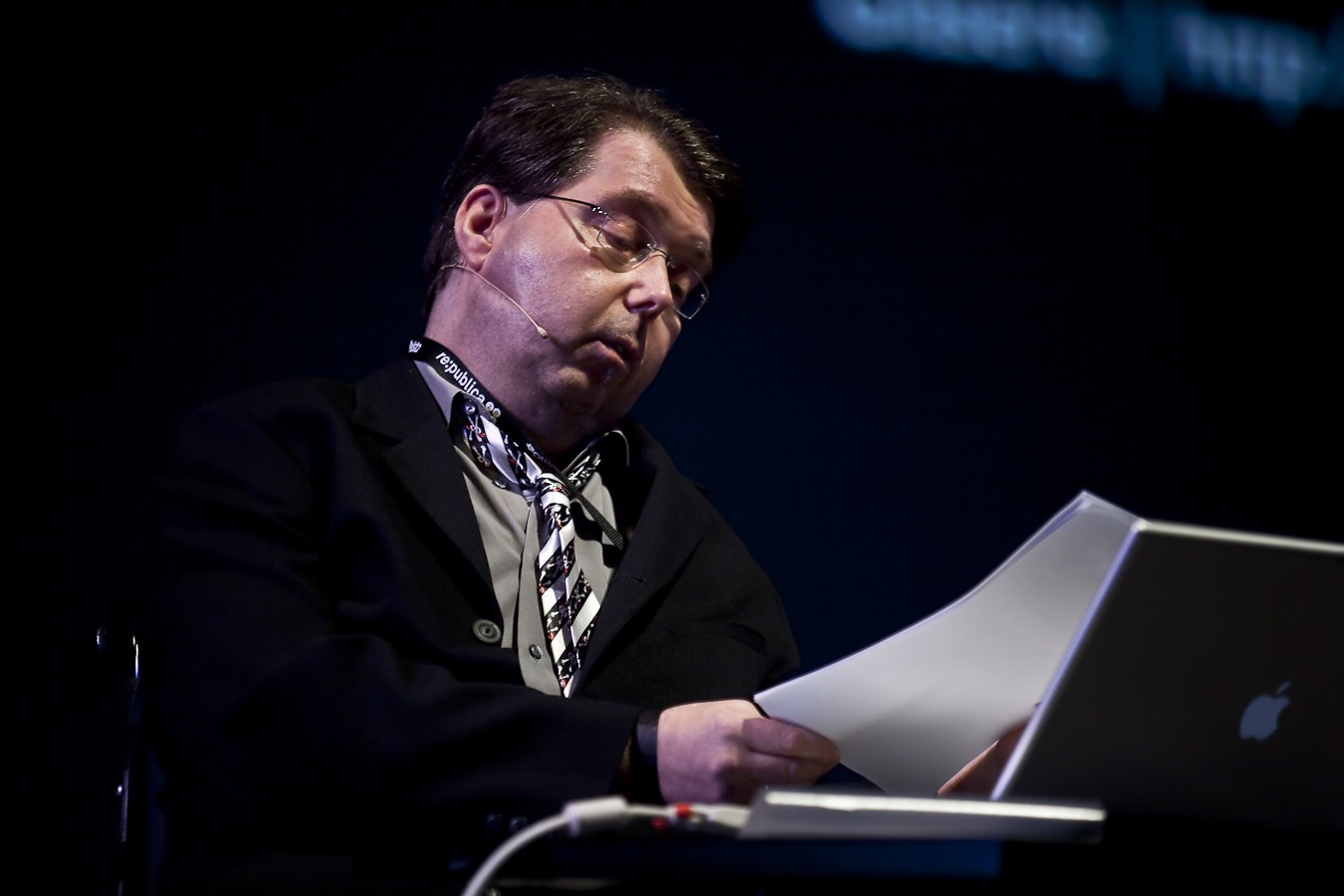 Peter Glaser bei seiner Keynote über das Leben auf dem achten Kontinent auf der re:publica10. Photo by Daniel Seiffert